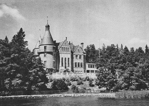 Villa Skärtofta, vy från BaggensfjärdenVilla Skärtofta